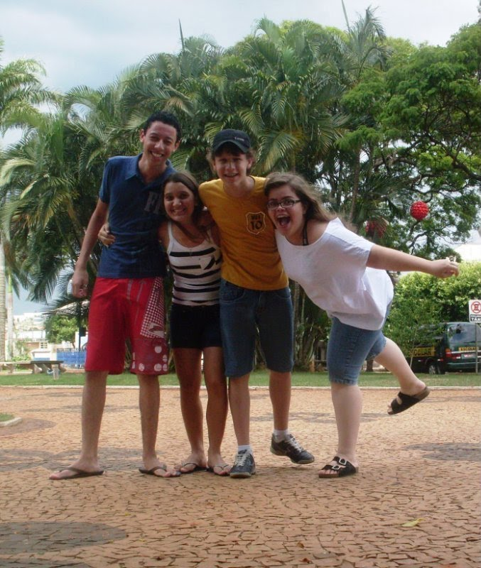 Foto de amigos verdadeiros abraçados